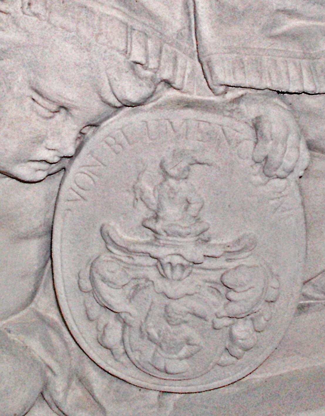 Wappen der Freiherrn von Blumencron, Detail vom Blumencron Gedenkstein, Prot. Kirche Wattenheim